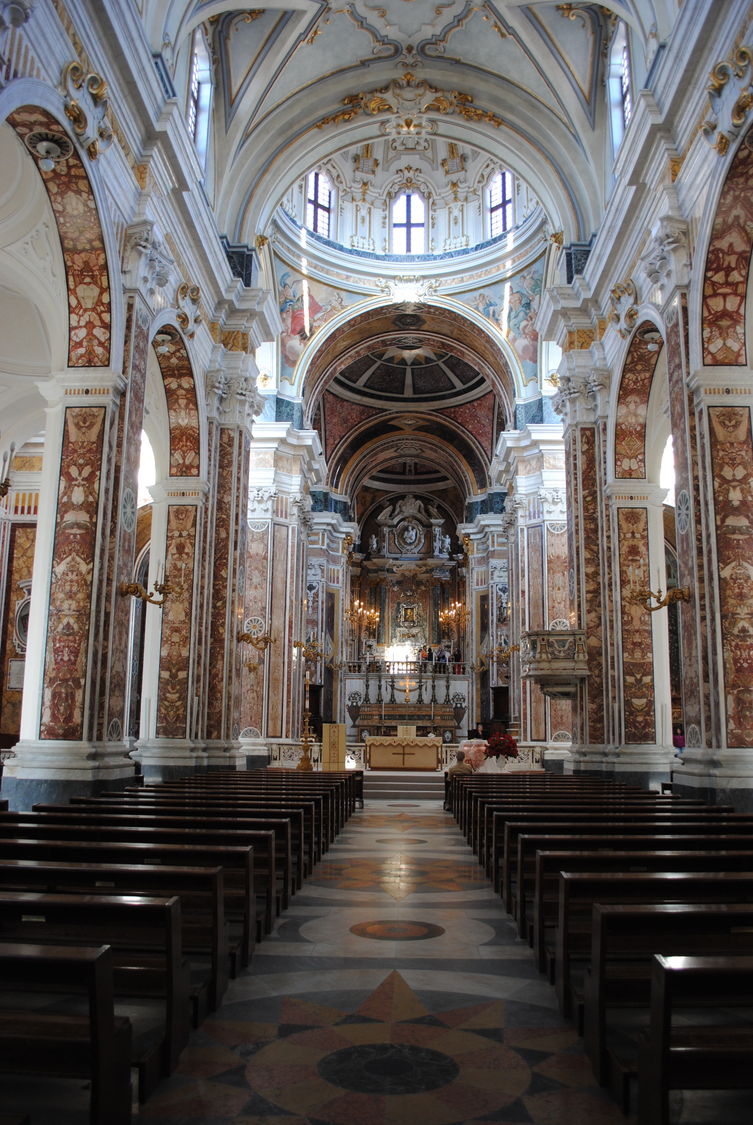 Interno della Cattedrale di Monopoli